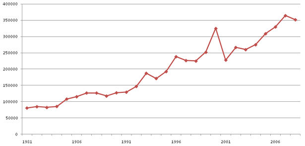 Passasjervekst på Kvernberget